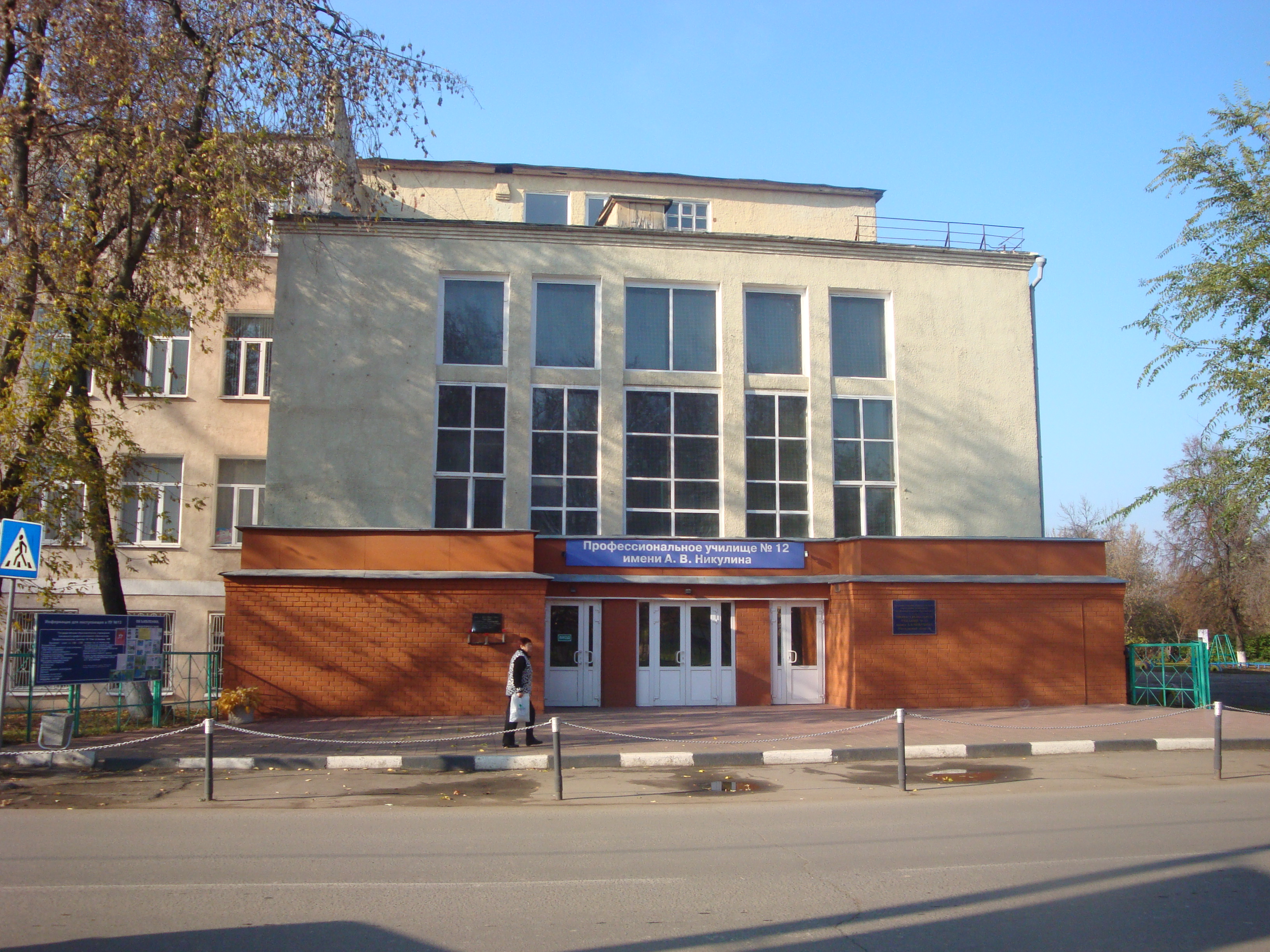 Профессиональное училище №12 имени А.В.Никулина в Подольске